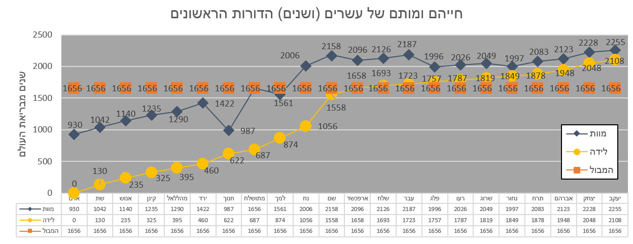 עשרים דורות מאדם הראשון ועד אברהם, יצחק ויעקב.